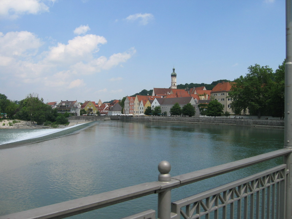 Landsberg Am Lech, Bavaria, Germany